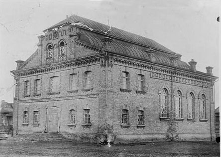 Беларуская (тарашкевіца): Тураў (Turaŭ). Вялікая сынагога